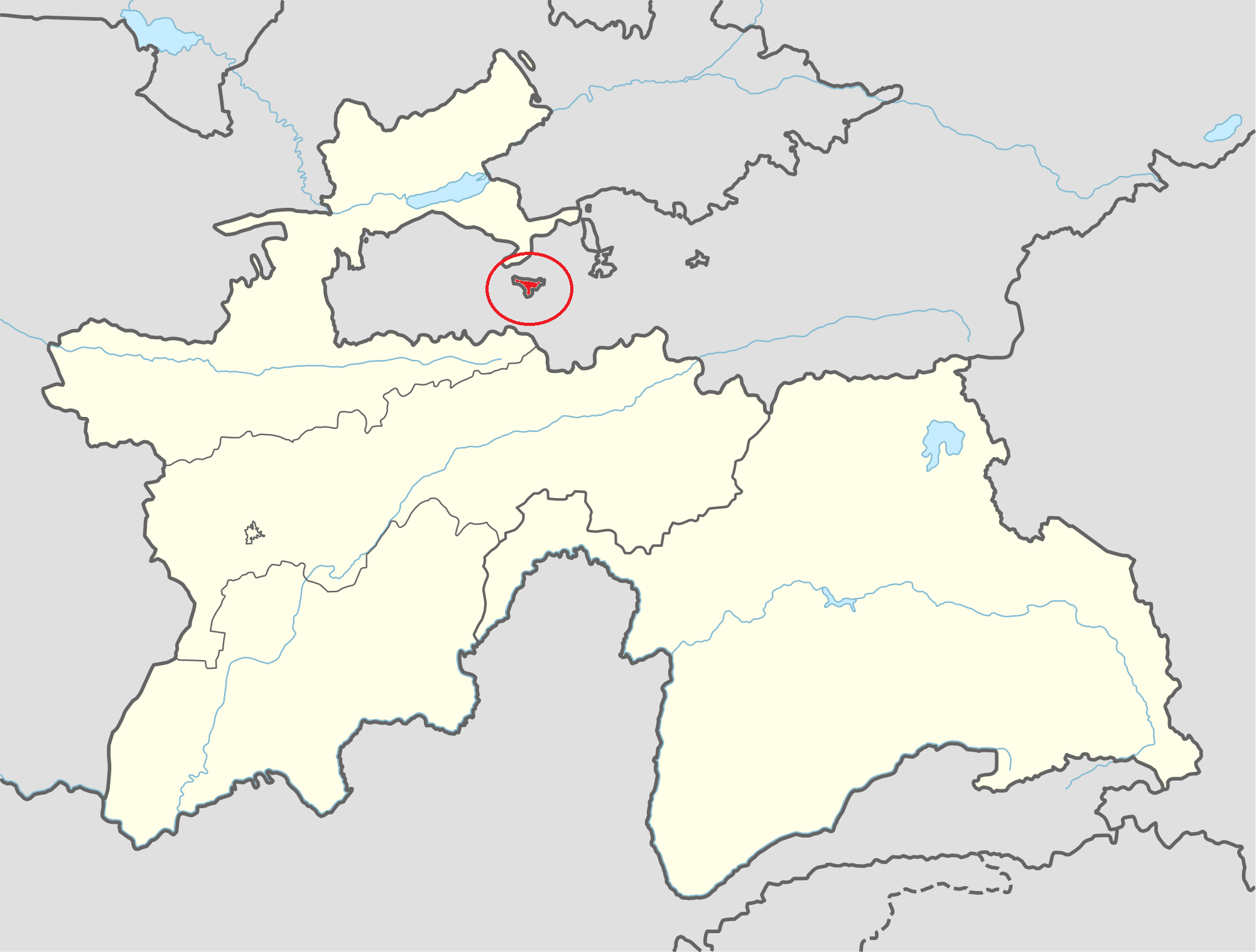 ヴォルフ（Vorukh）の地図